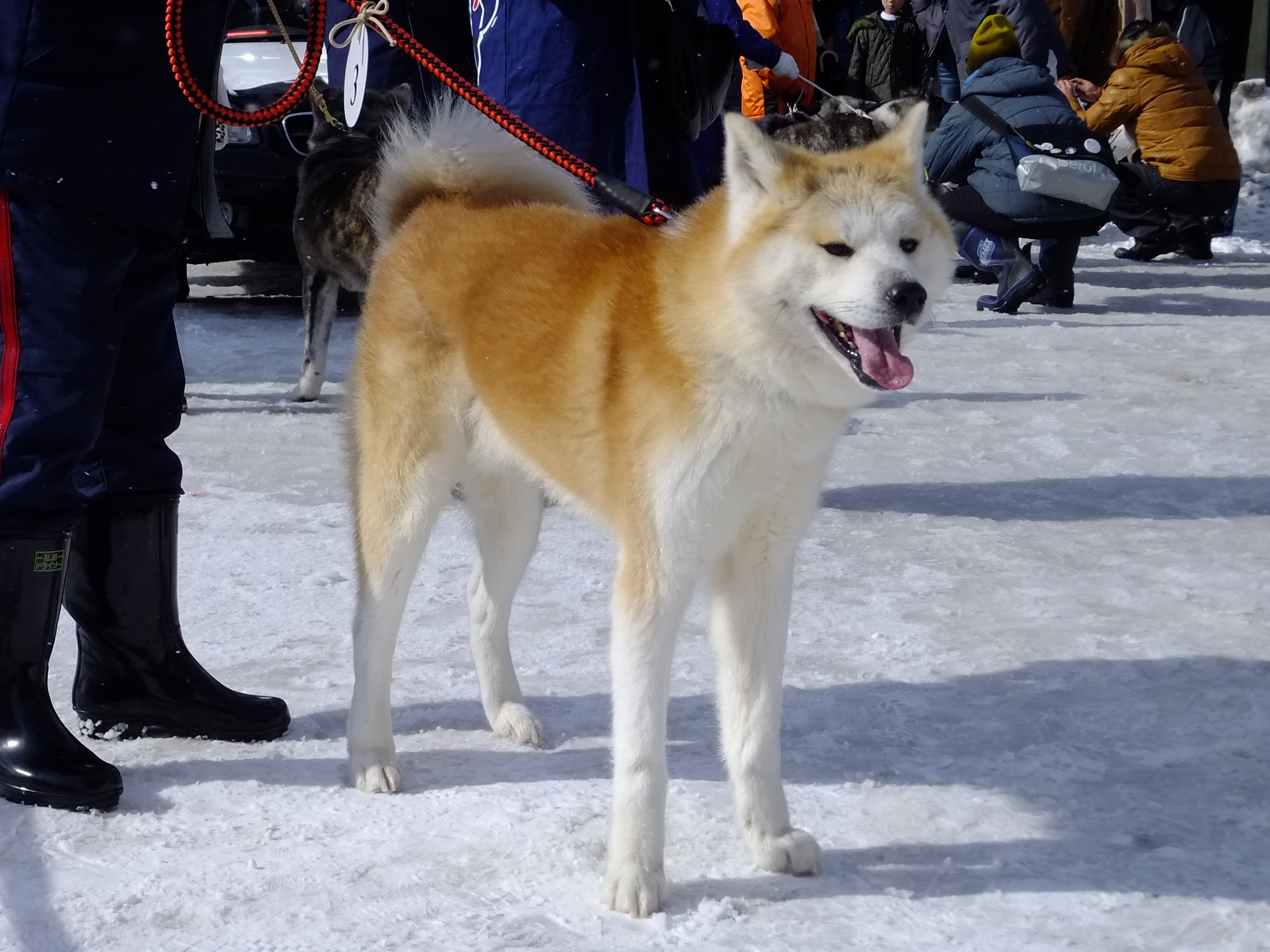 大館アメッコ市、秋田犬パレード会場にて